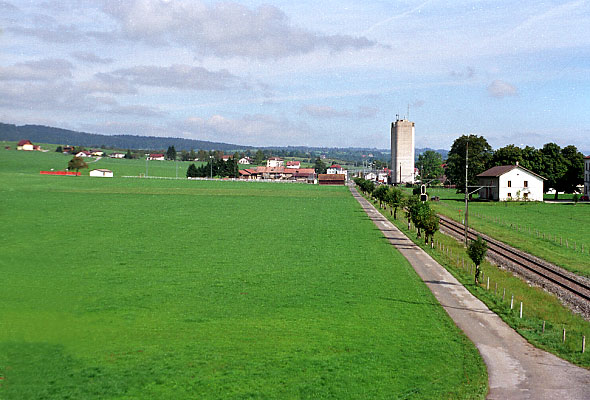 Les Verrières